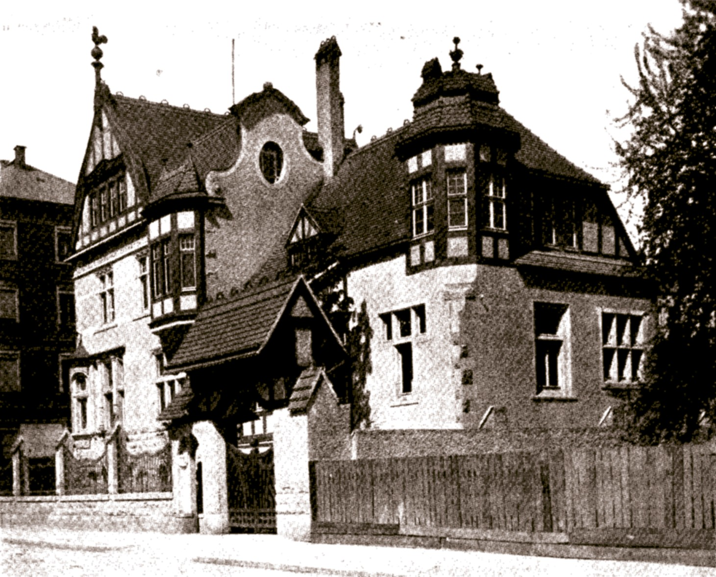 Villa „Friedrichsruh“ in Dresden-Löbtau, Hermsdorfer Straße 16; erbaut 1898 nach Entwurf der Dresdner Architekten Rudolf Schilling und Julius Wilhelm Graebner; unter Denkmalschutz